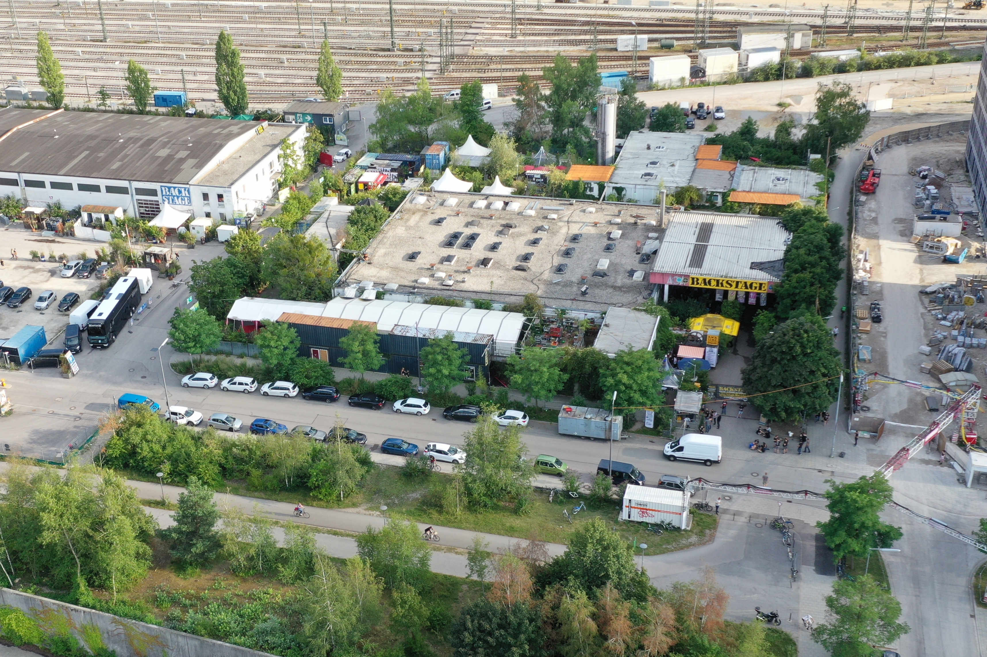 Das Backstage-Gelände: Rechts der Eingang, links das große Backstage "Werk" und hinten von links Biergarten, Halle und Club.